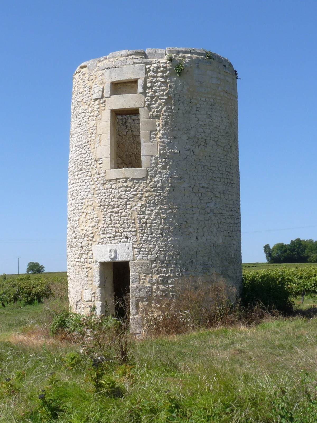 Ancien moulin route de Neuillac, Neulles, Charente-Maritime, France